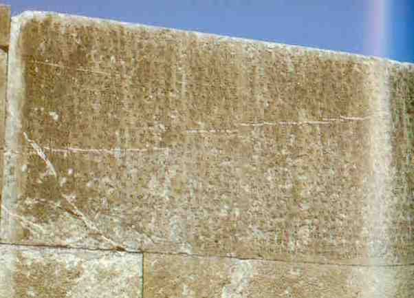 کتیبه پی بنای تخت جمشید توسط داریوش بزرگ در دیواره جنوبی تخت جمشید